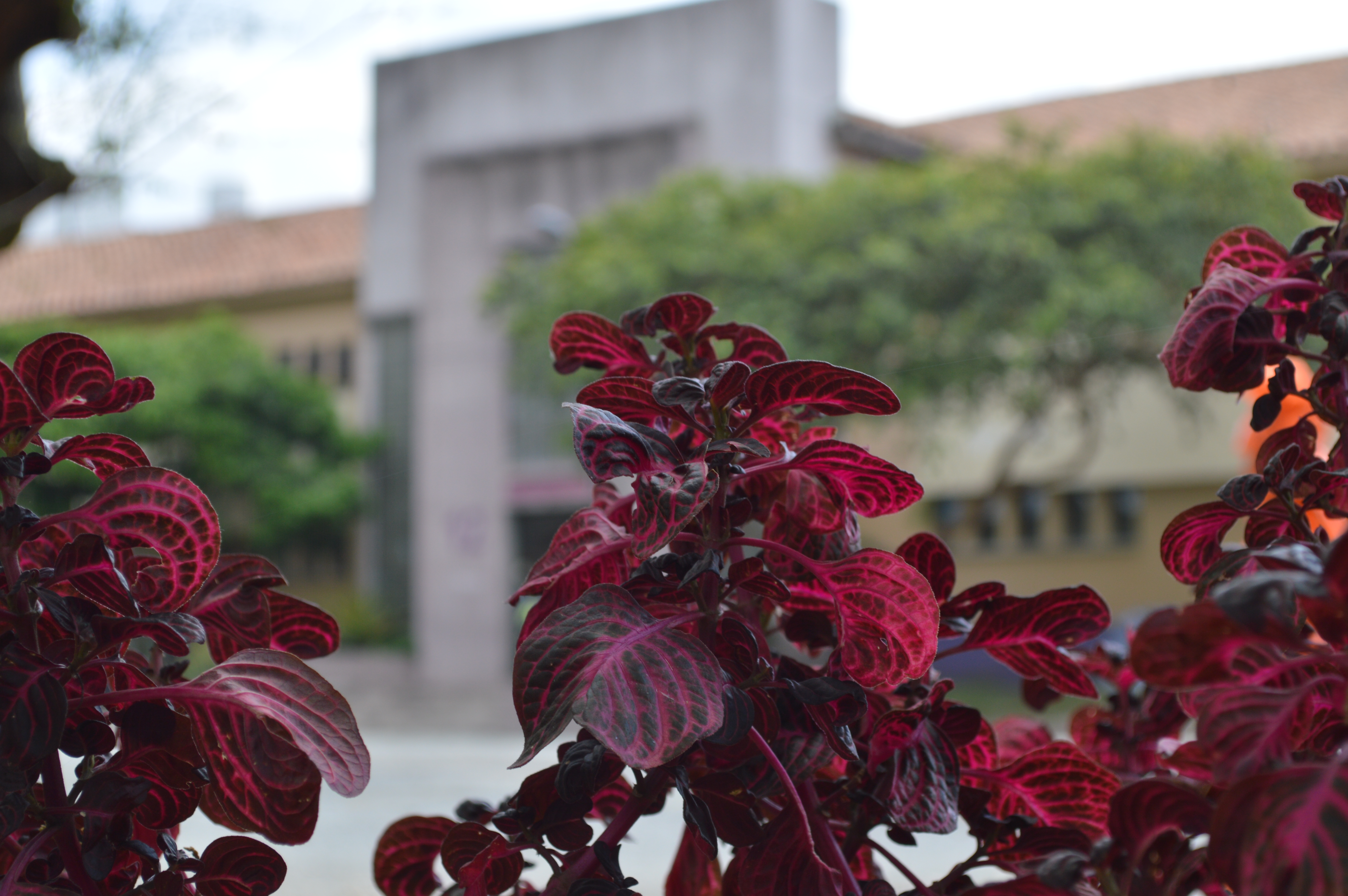 Foto lateral